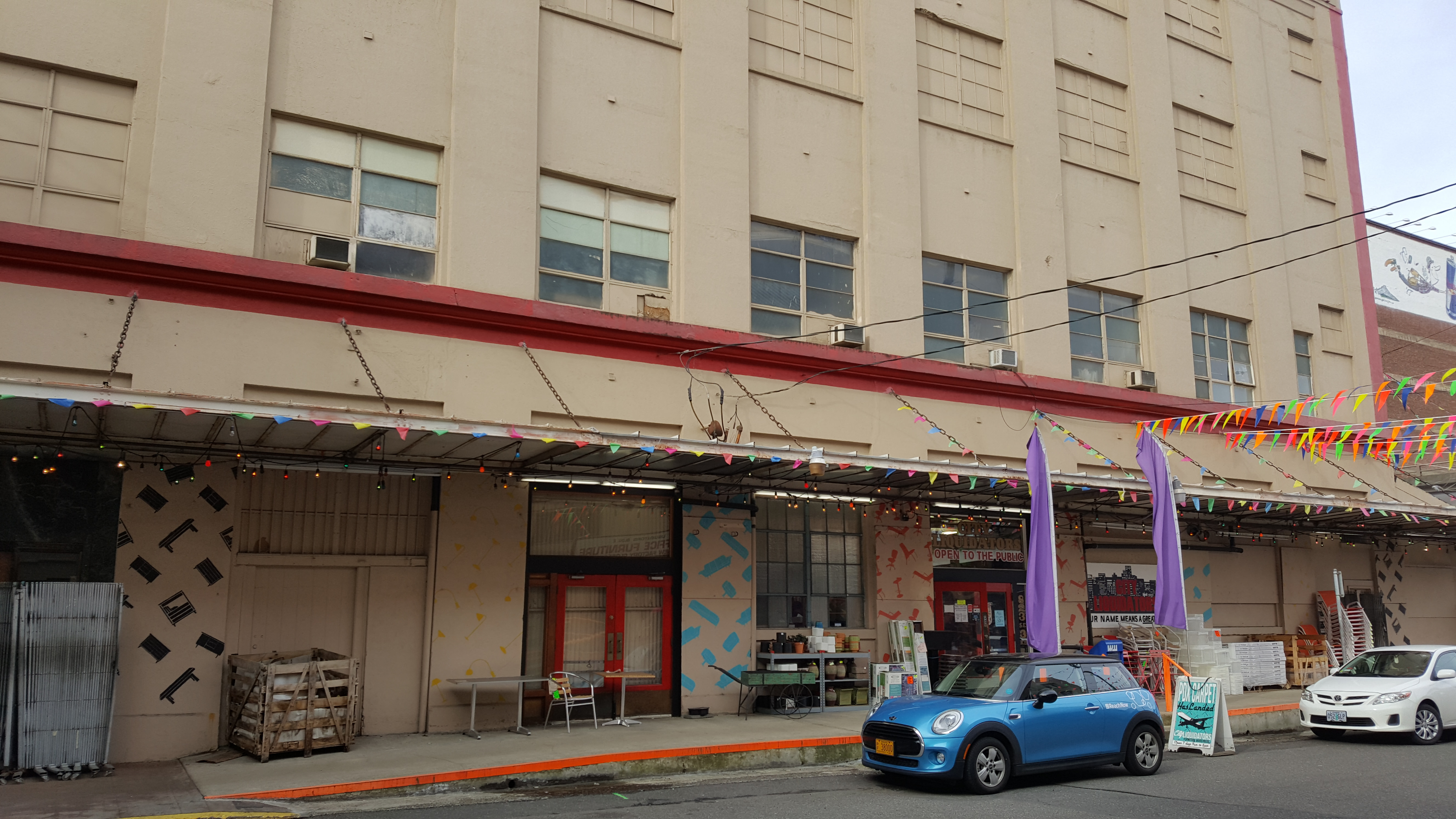 City Liquidators, PDX, 2017